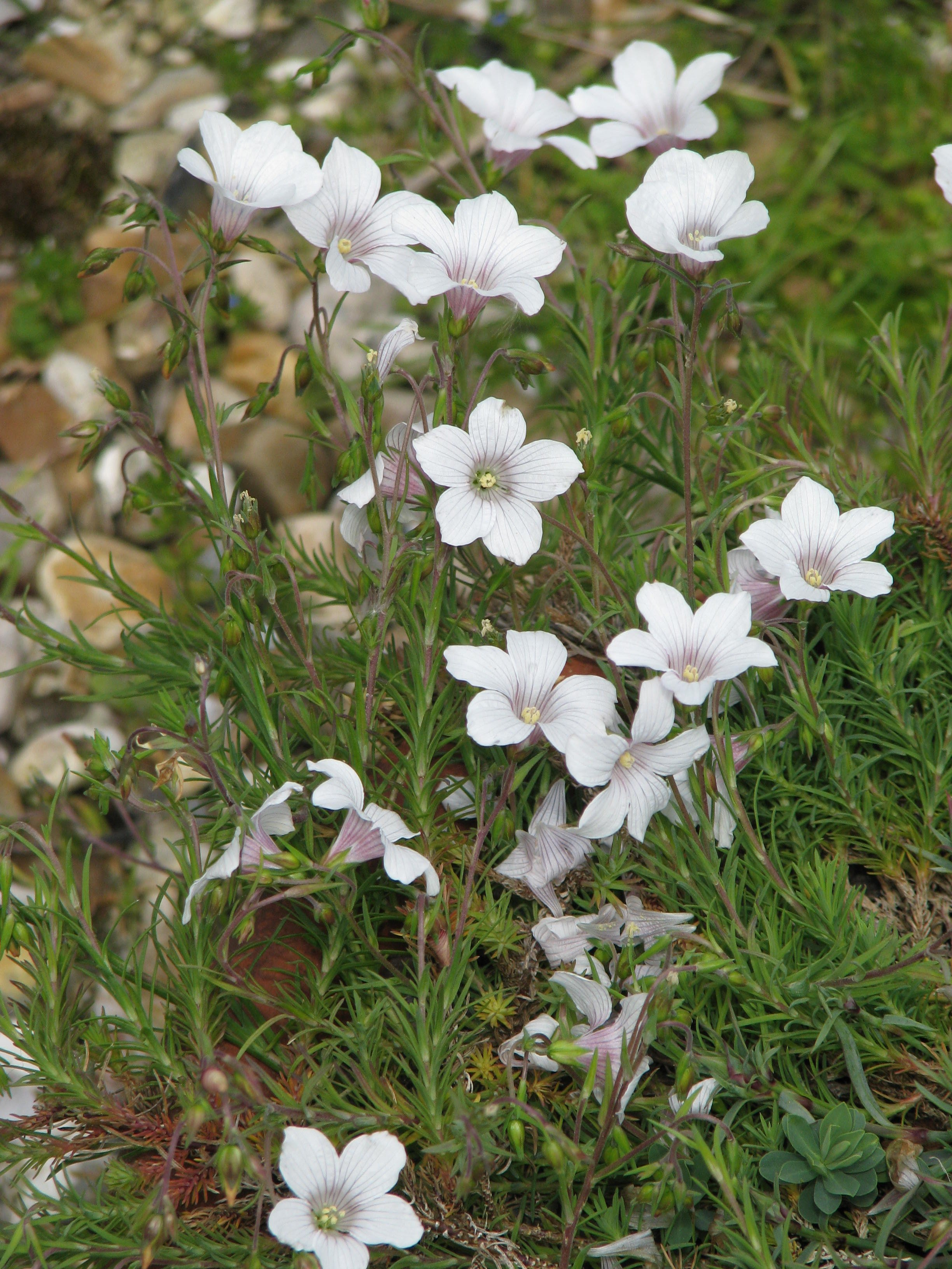 Linum suffruticosum salsoloides